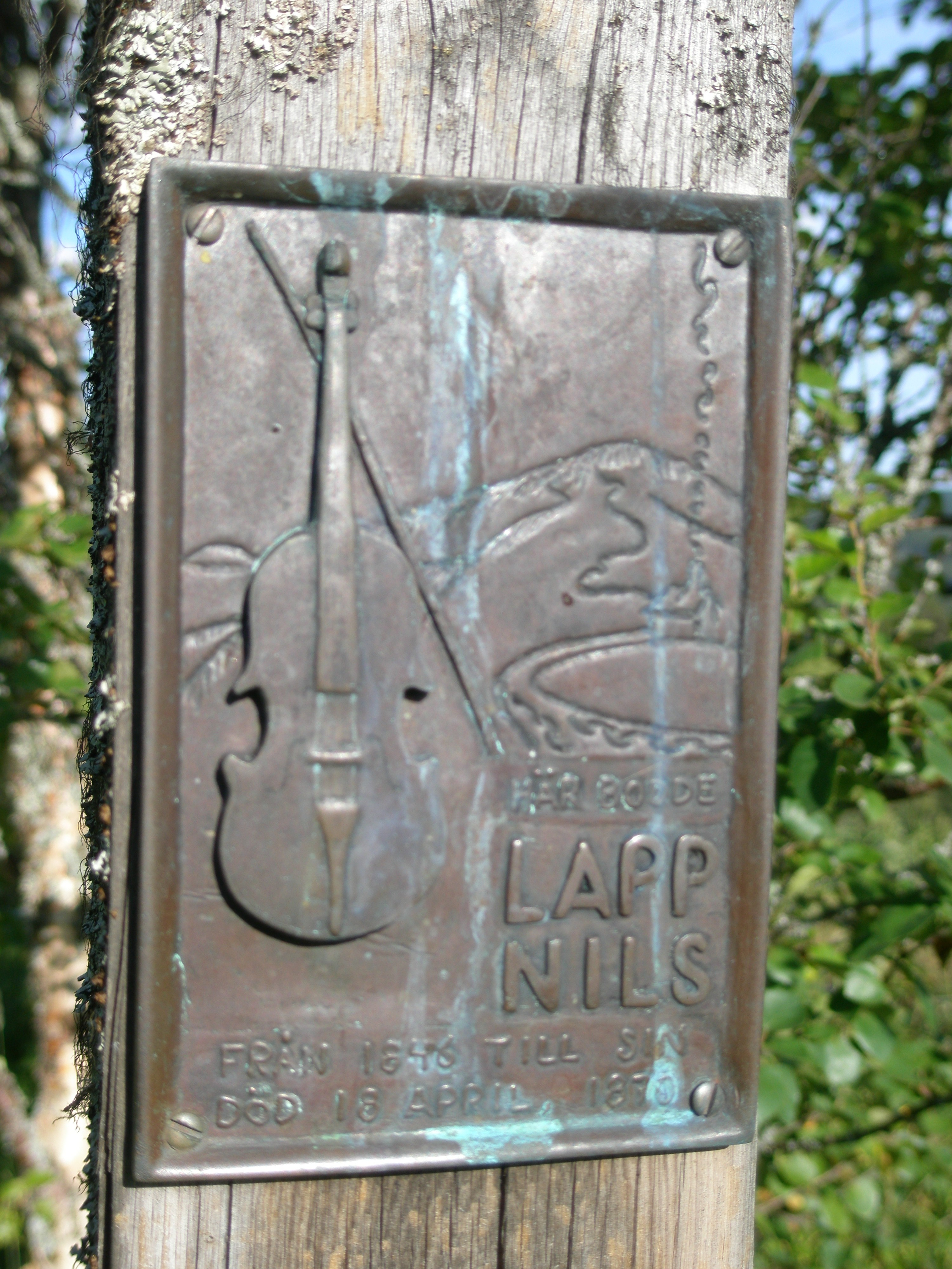 Minnesmärke vid LappNilstorpet i Önet, Offerdals socken, Krokoms kommun, Jämtland, Sverige.